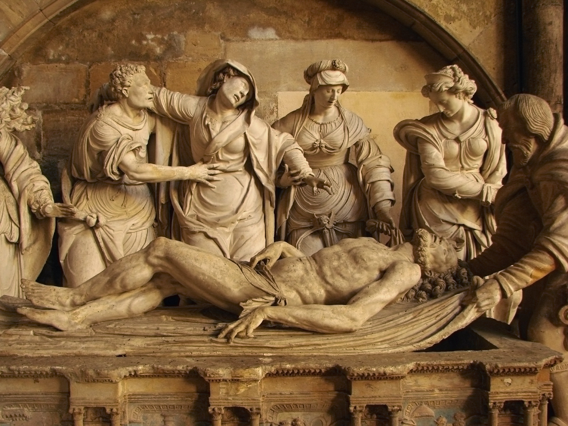 Sépulcre, 16ème siècle, dans l'église Notre-Dame de Joinville, Haute-Marne.